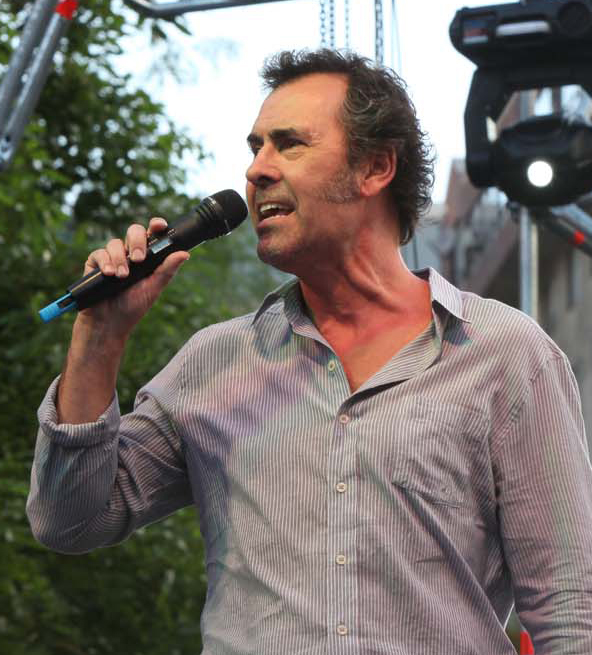 Juan Cristián Campos Sallato (n. Santiago de Chile, 1956) es un destacado actor chileno, que ha participado en muchas telenovelas, y miniseries, estudió en la Escuela de Teatro de la Universidad Católica de Chile. Hijo de Javier Abraham Campos Pastor y Sara Sallato Pouchucq, su primer matrimonio con Claudia Di Girólamo en 1984, con quien tuvo dos hijos, actualmente se encuentra casado con la también actriz María José Prieto en 2009.